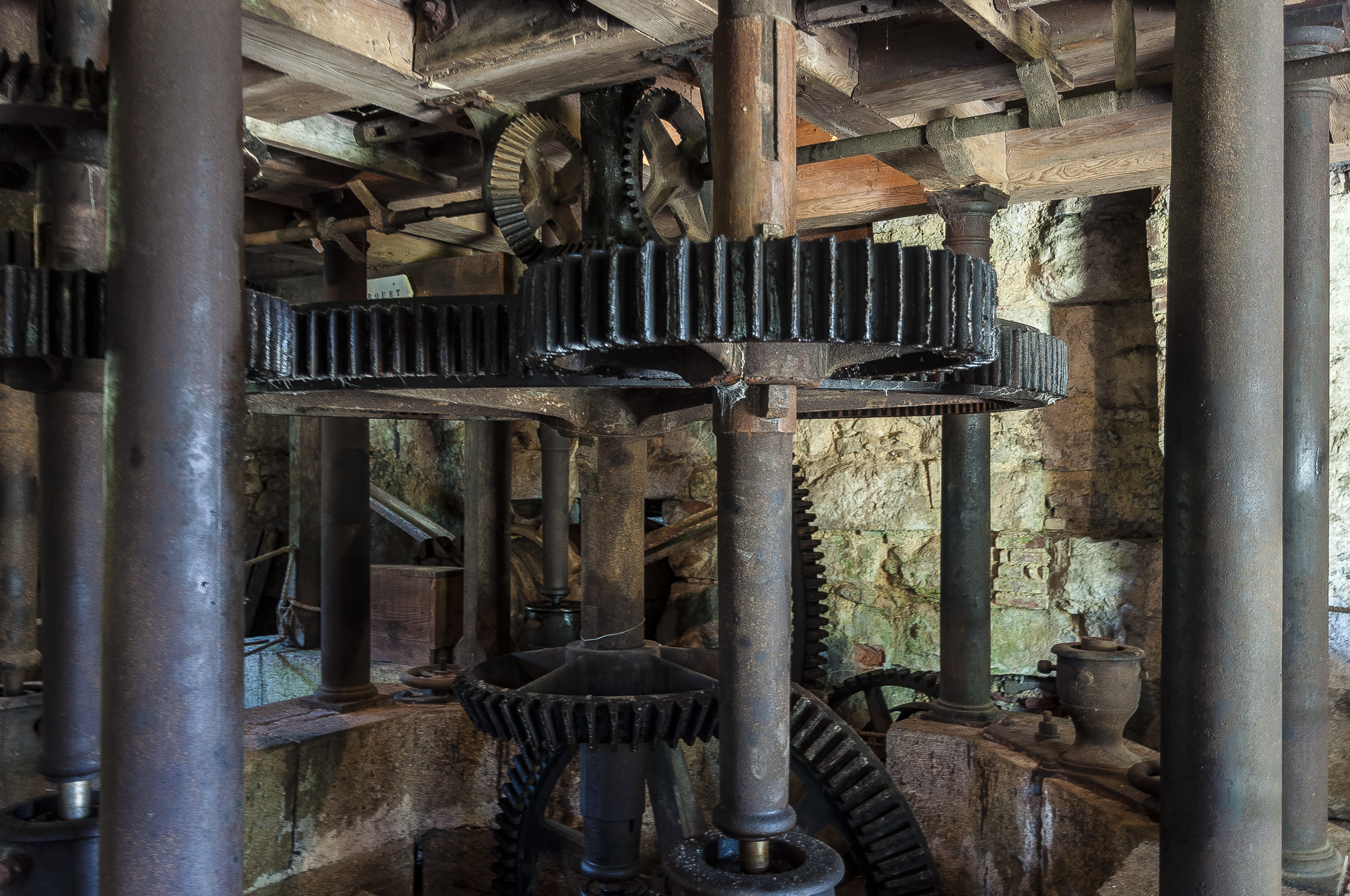 Le moulin de Courtelevant (ou moulin Marion1) est un moulin à eau .